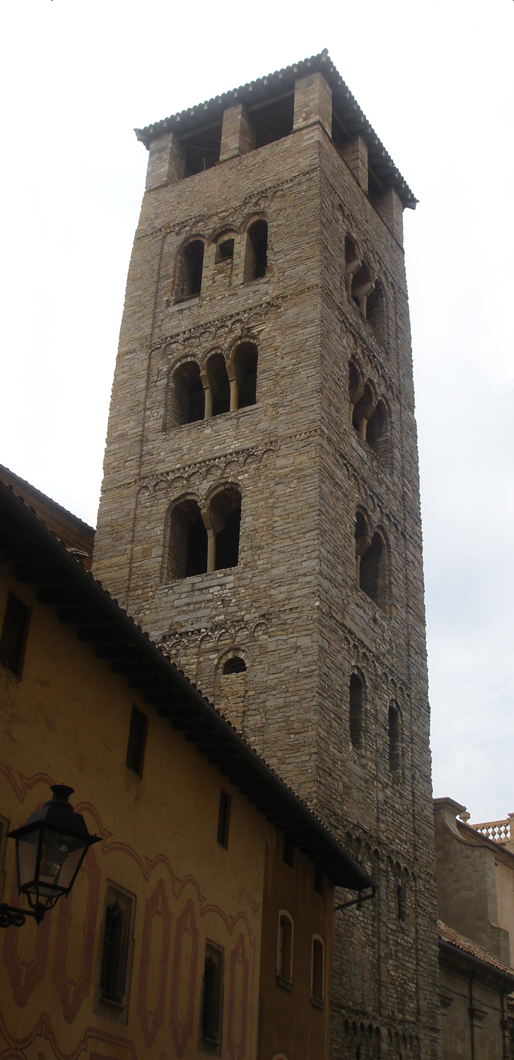 Catedral de Sant Pere de Vic (Vic, Osona, Catalunya, Espanya)